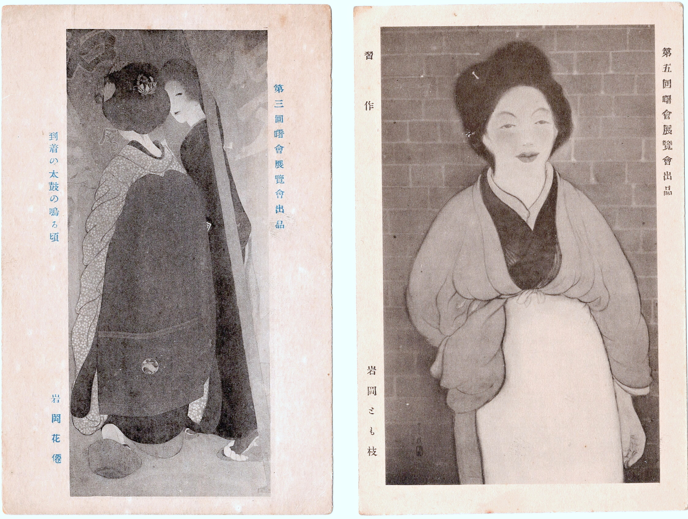 岩岡とも枝作品